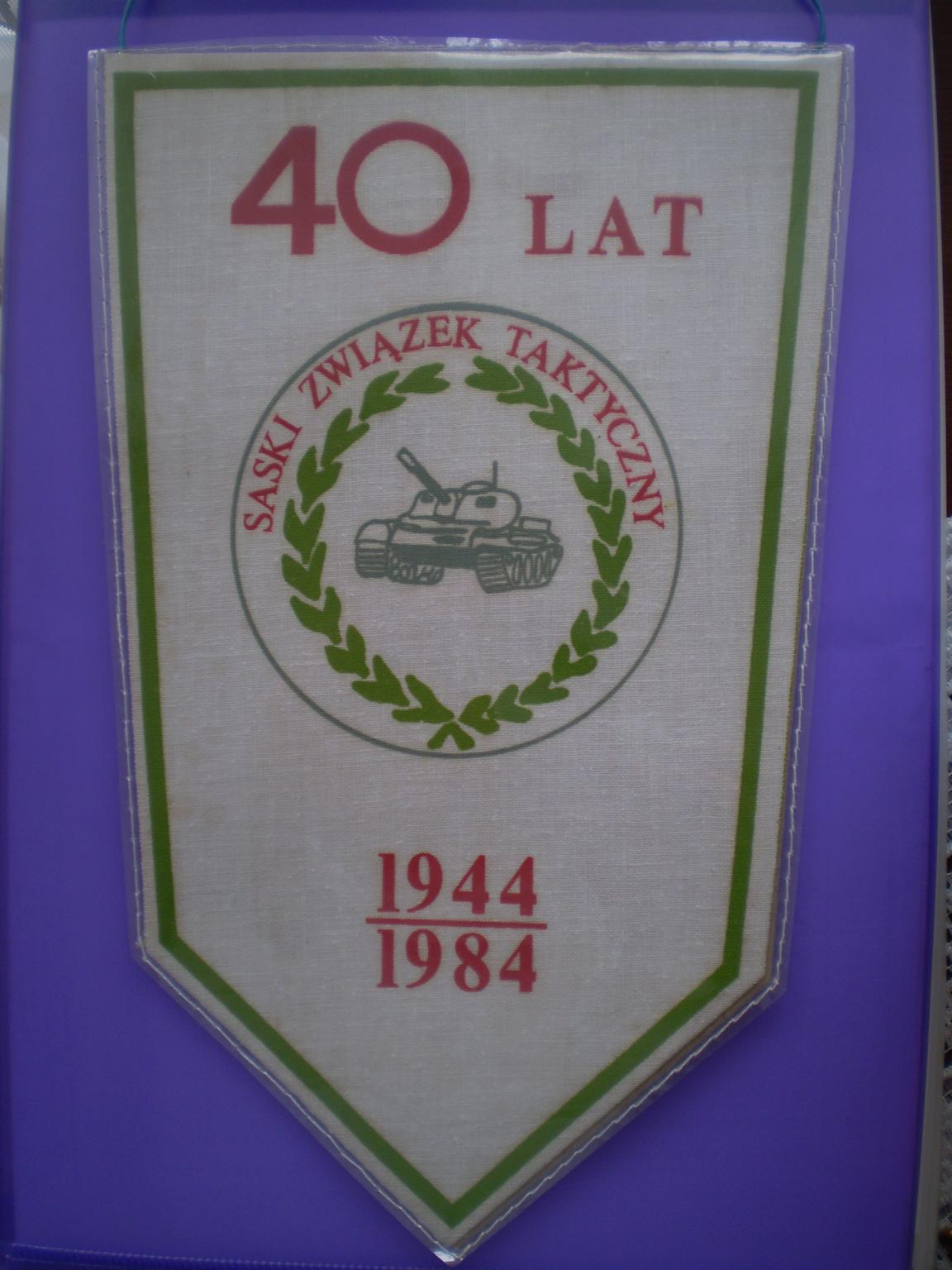 Proporczyk pamiątkowy 2 br z Gubina